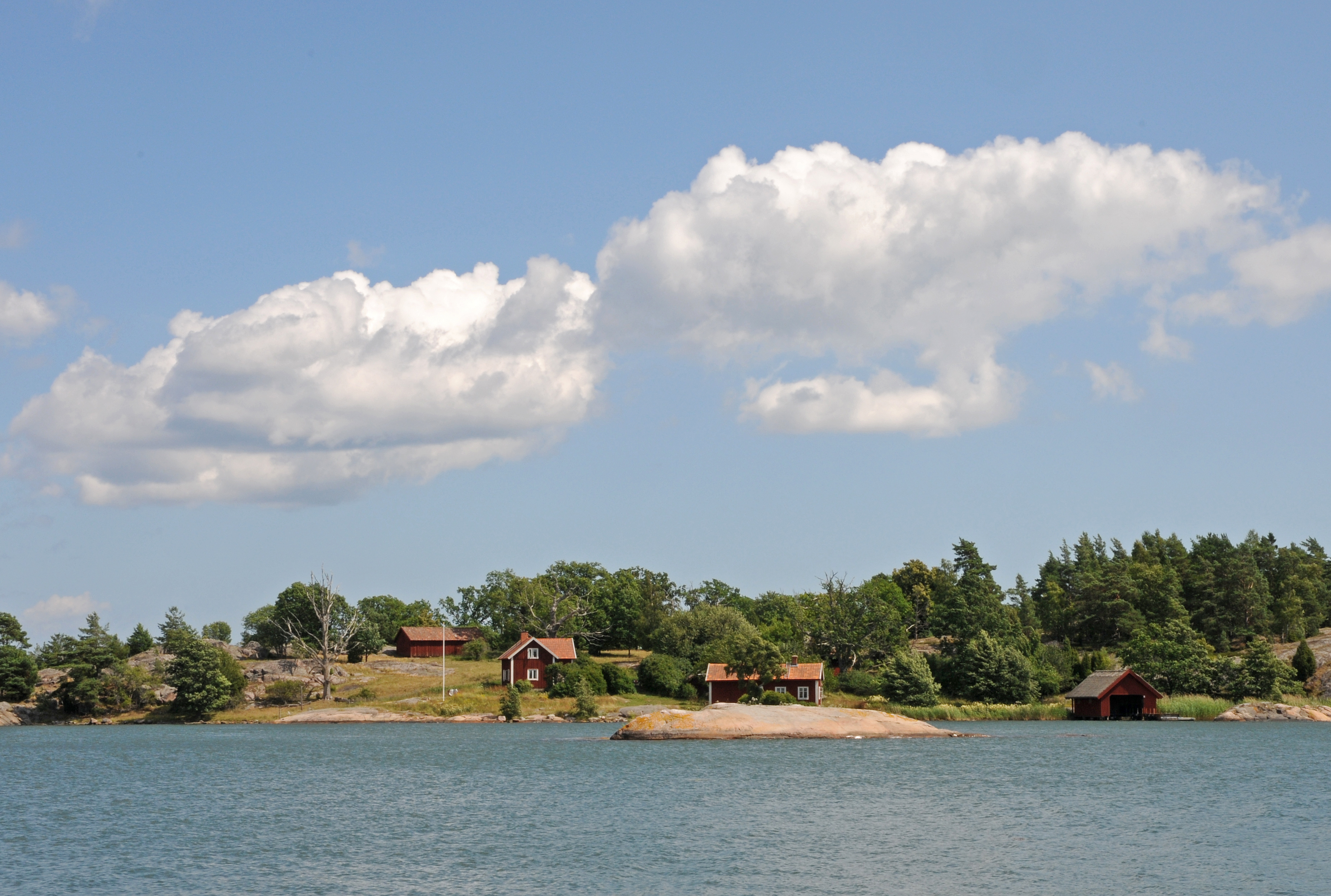 Stendörrens naturreservat i Nyköpings kommun